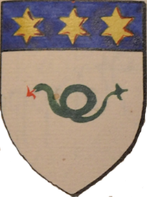 D'argent à la guivre de sinople repliée par le milieu, languée de gueules, au chef d'azur chargé de trois étoiles d'or.